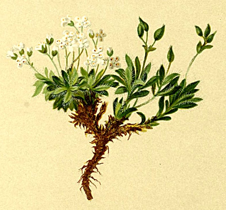 Draba fladnitzensis